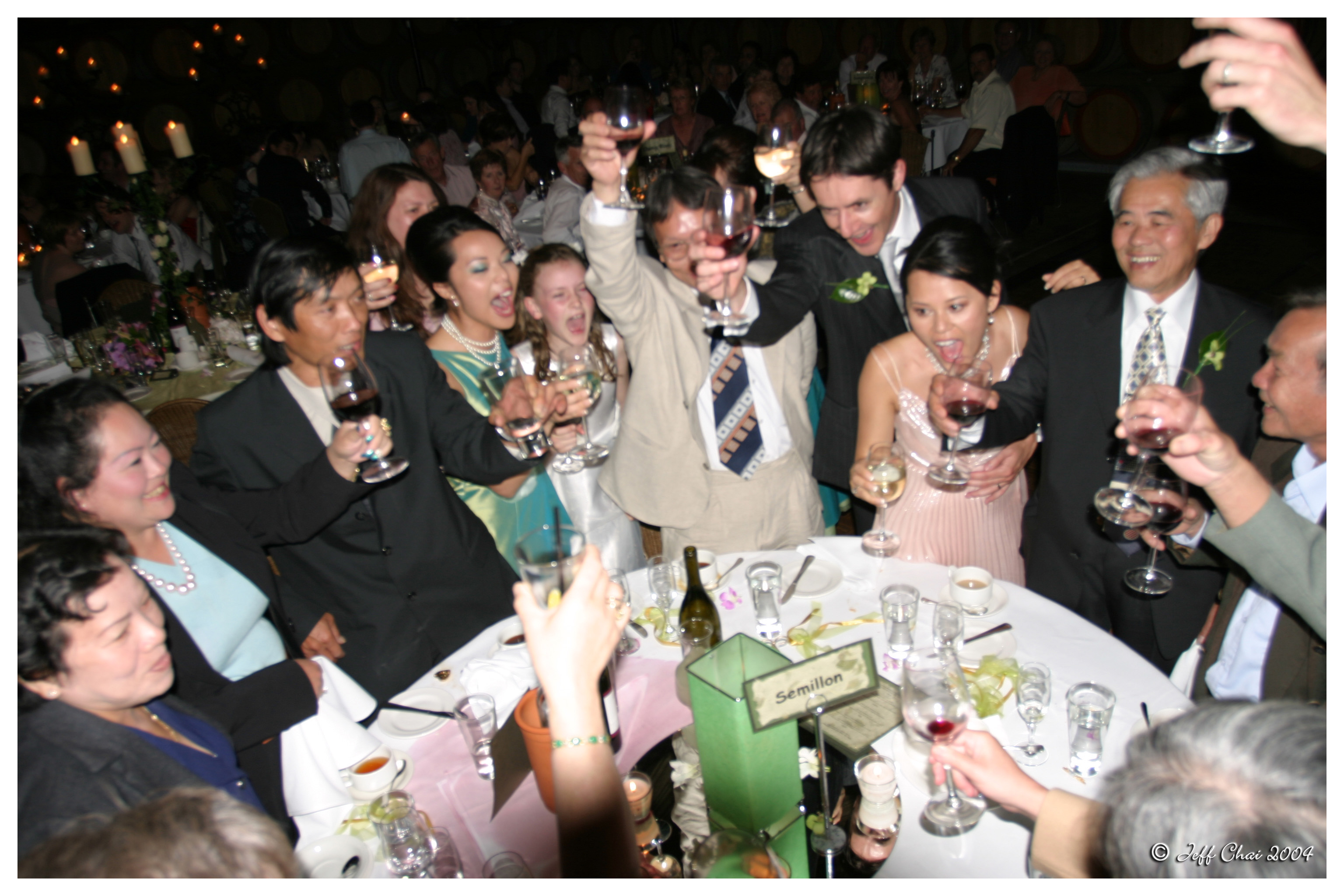 הרמת כוסית במסיבת חתונה - שלב ה"הסכמה". La .lojban.: salci.